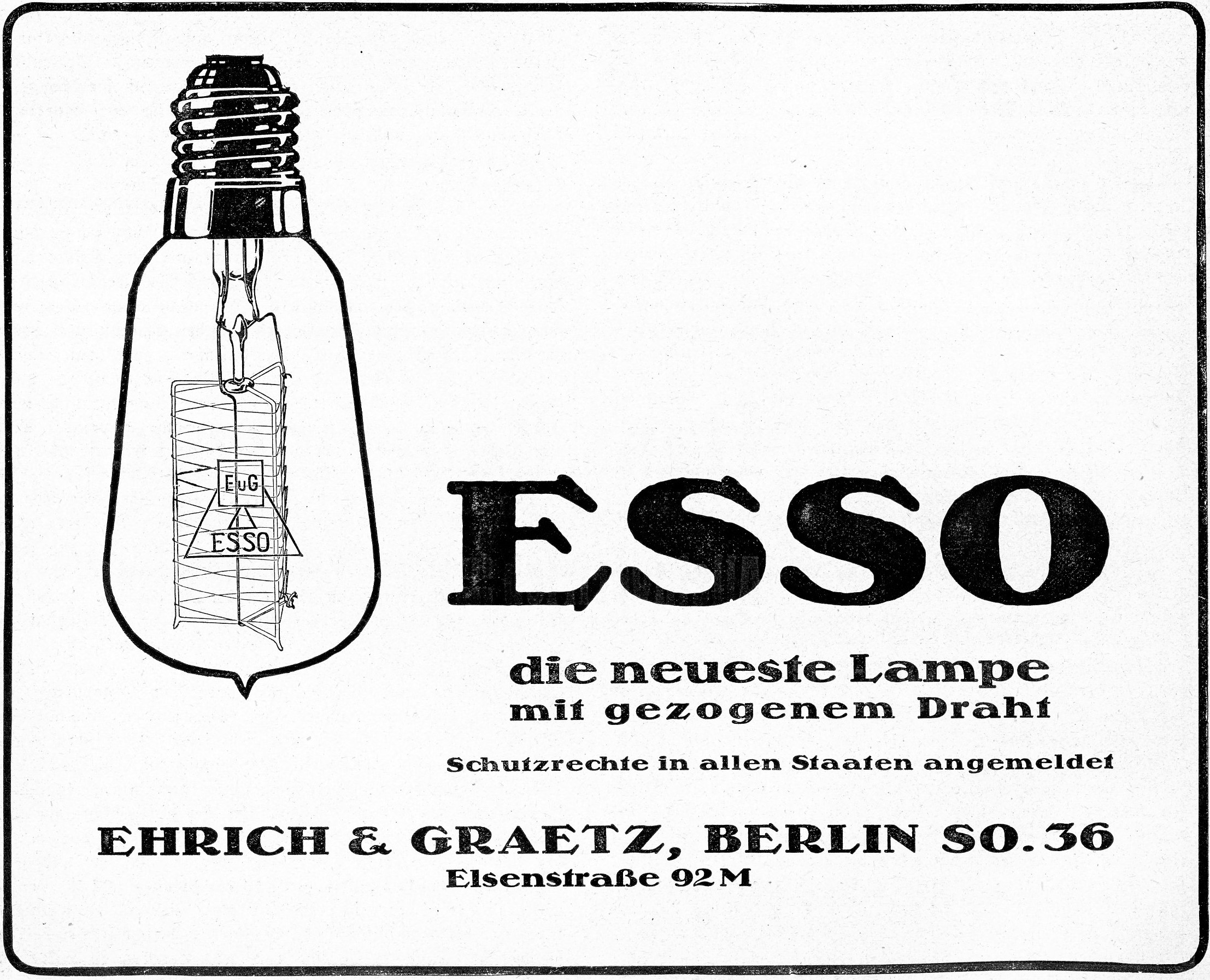 Werbeanzeige der Firma Ehrich & Graetz für ihre Glühlampe mit dem Eigennamen Esso